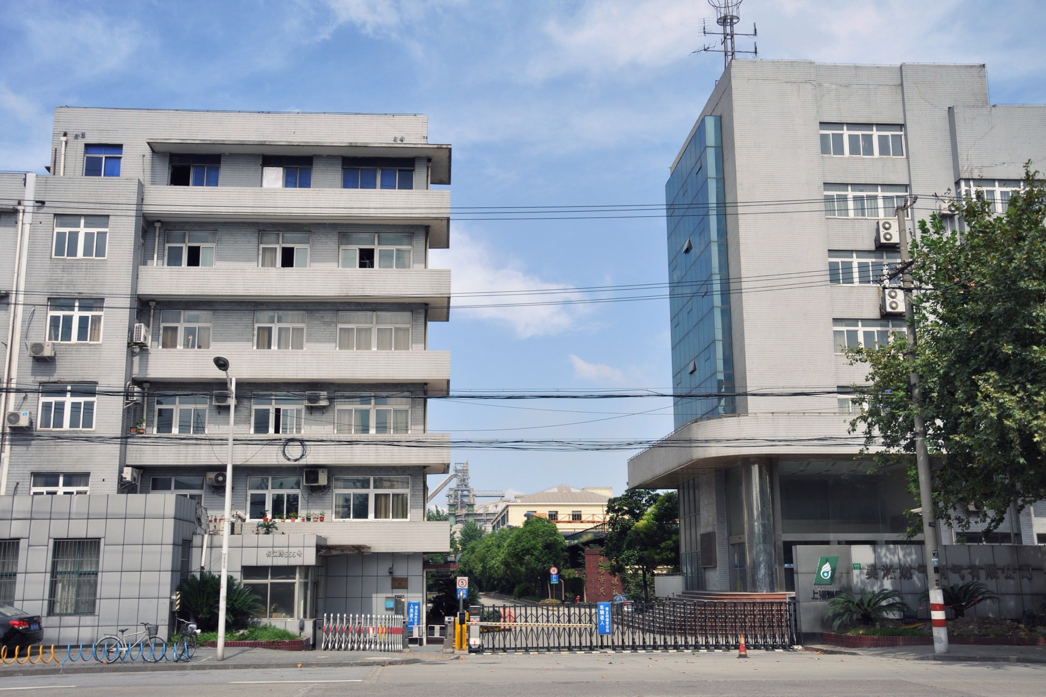 吴淞煤气厂旧址 长江路555号 1938年 吴淞煤气制气有限公司